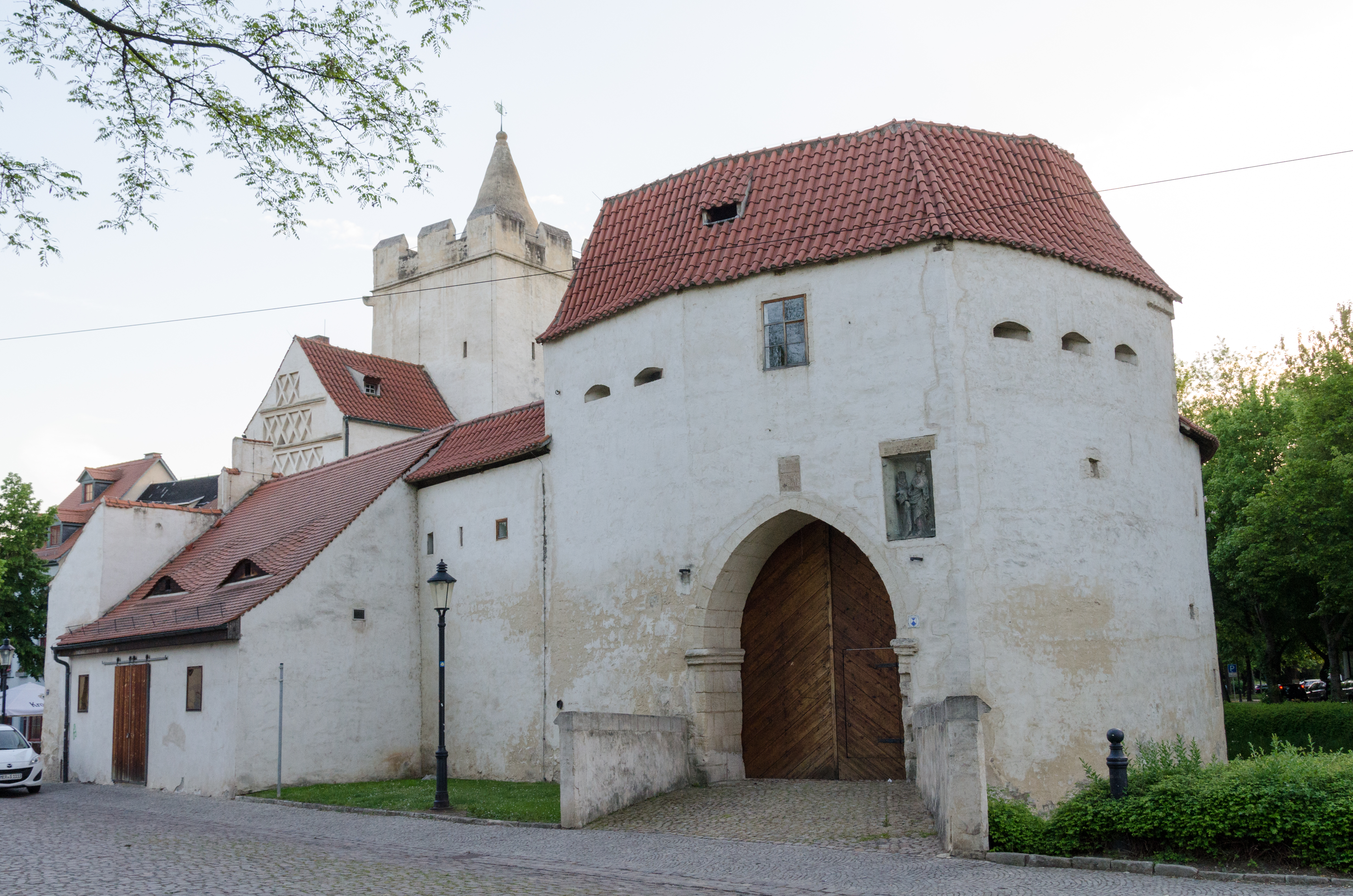 Naumburg, Stadtbefestigung, Marientor